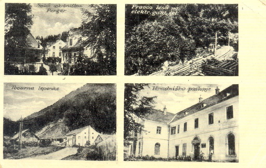 Razglednica Mislinje.